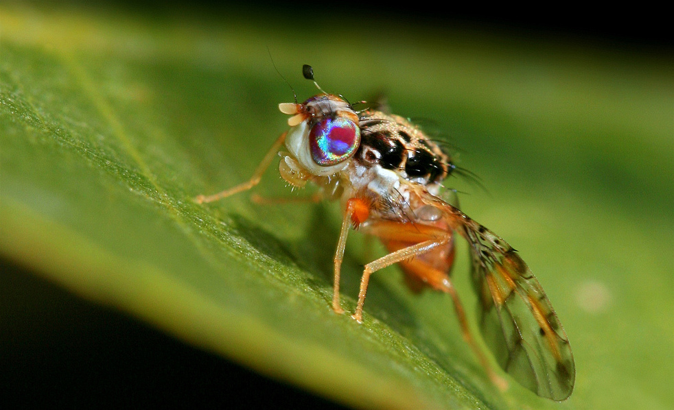 Tephritidae Ceratitis capitata, male